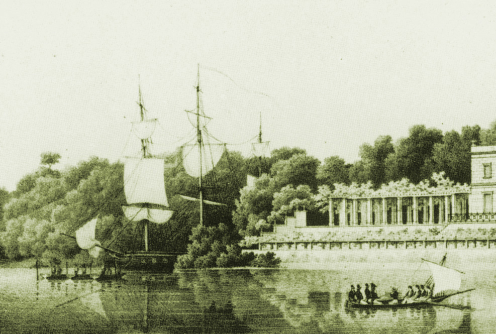 Klein Gienicke Fregattenattrappe Veröffentlichung von Schinkel 1840